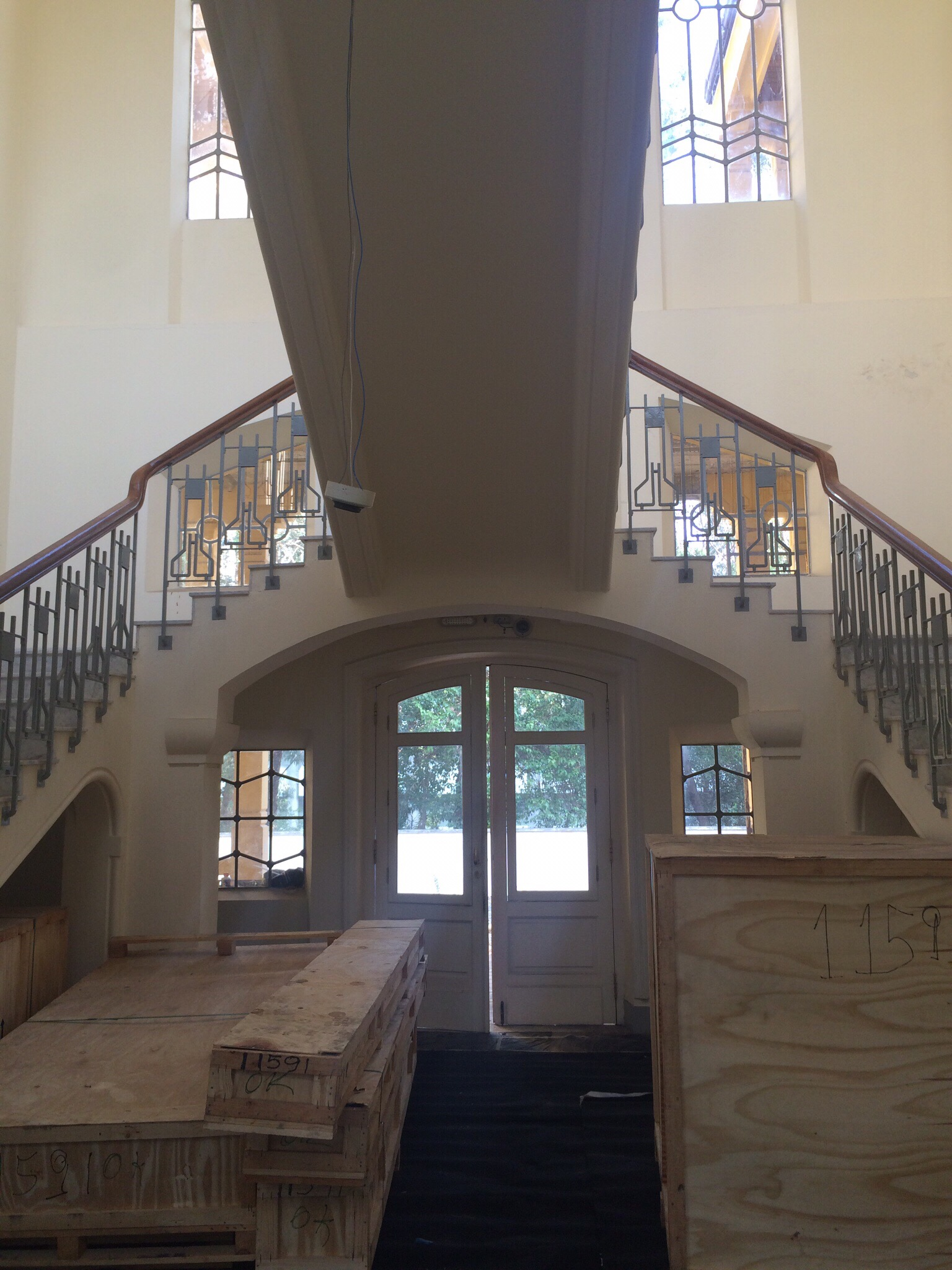 Hall de entrada da EEPG Campos Sales em reforma